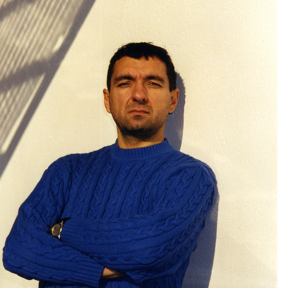 Foto des russischen Schriftstellers Vasiliy Dimov